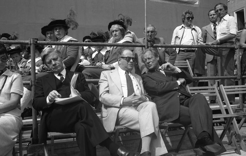 Eröffnung des Europa-Wahlkampfs der SPD mit Bundeskanzler Helmut Schmidt und Willy Brandt in Nürnberg.